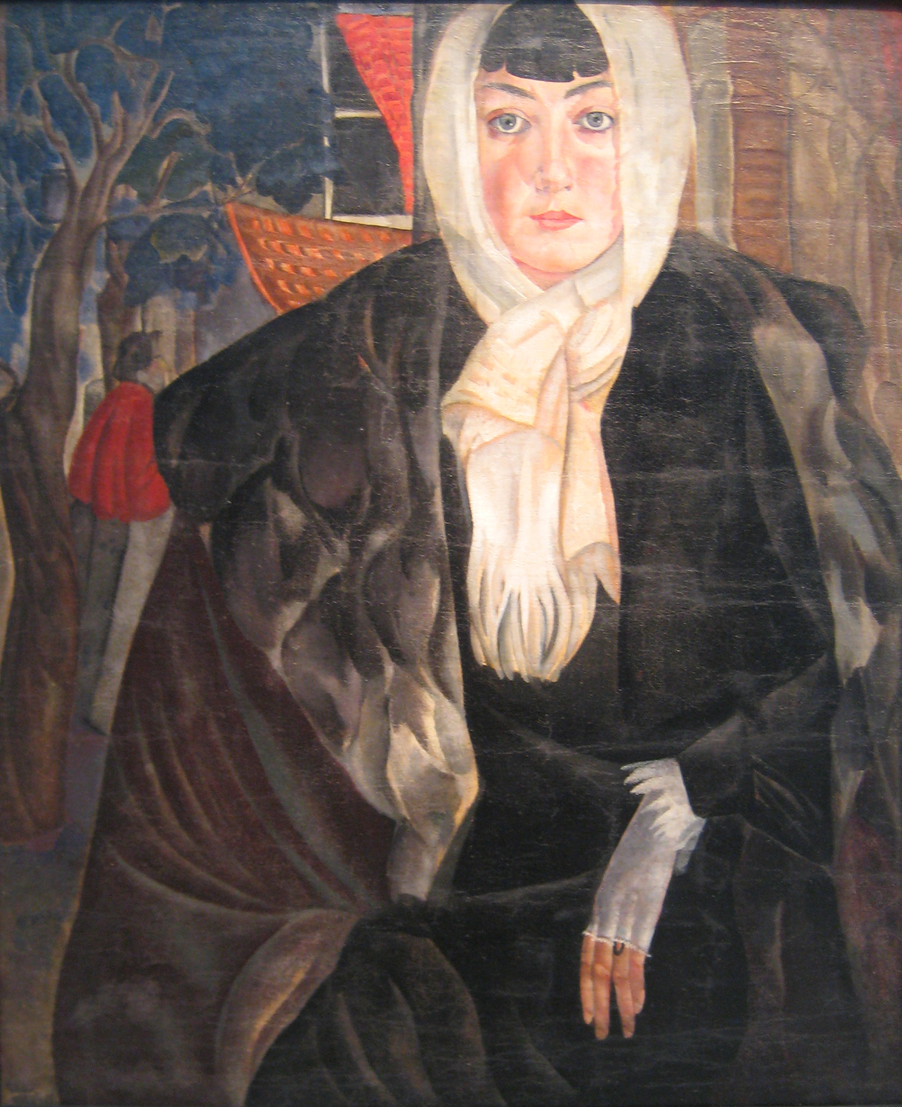 Григорьев Борис Дмитриевич. Женский портрет ("Душка"). 1917. Частное собрание, СПб